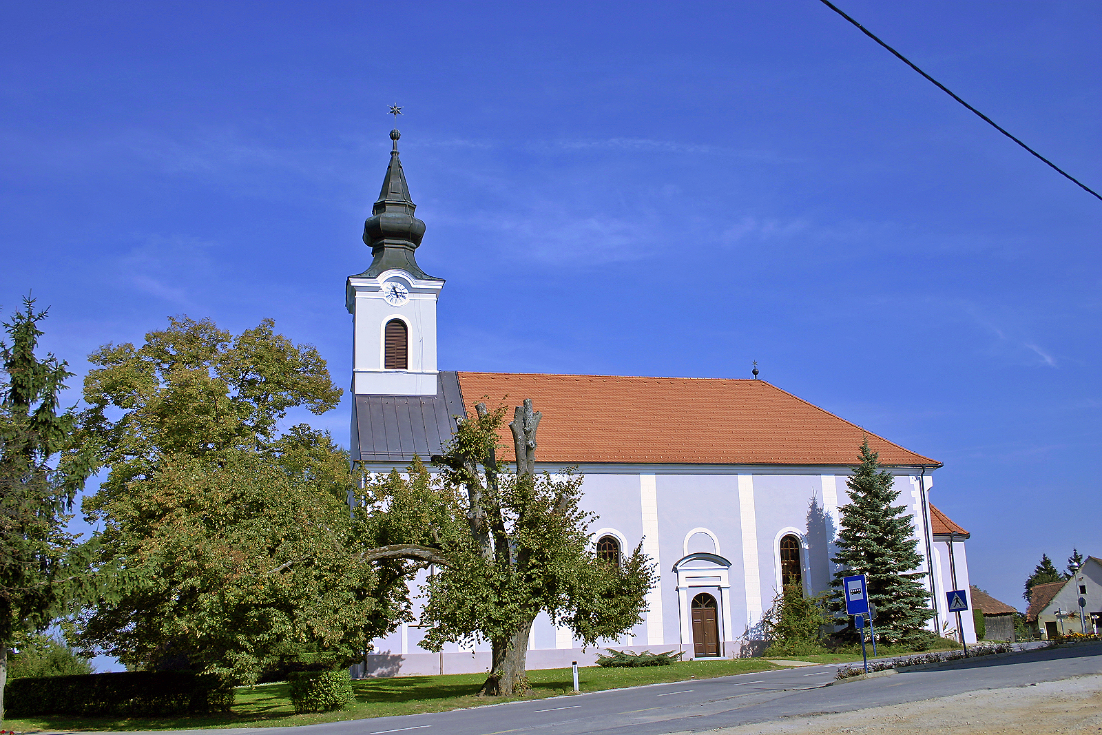 Evangeličanska cerkev, Križevci. Evangelical church, Križevci. Evangelische Kirche, Križevci.